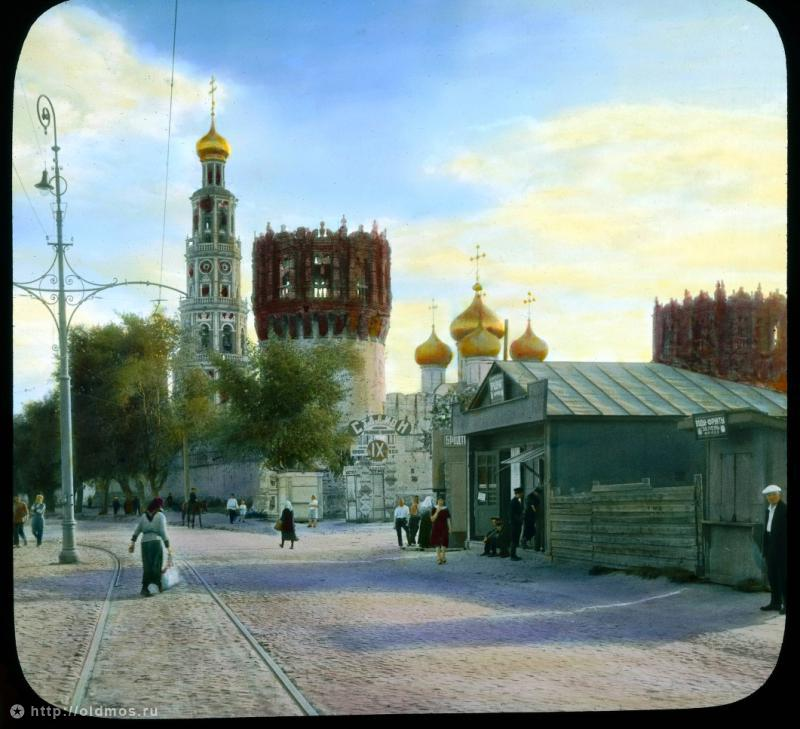 Москва. Новодевичий монастырь